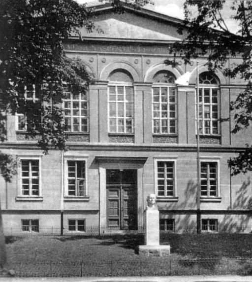 Mittelfrontdes Gymnasiums Marienwerder, Schillerbüste vor dem Eingang.